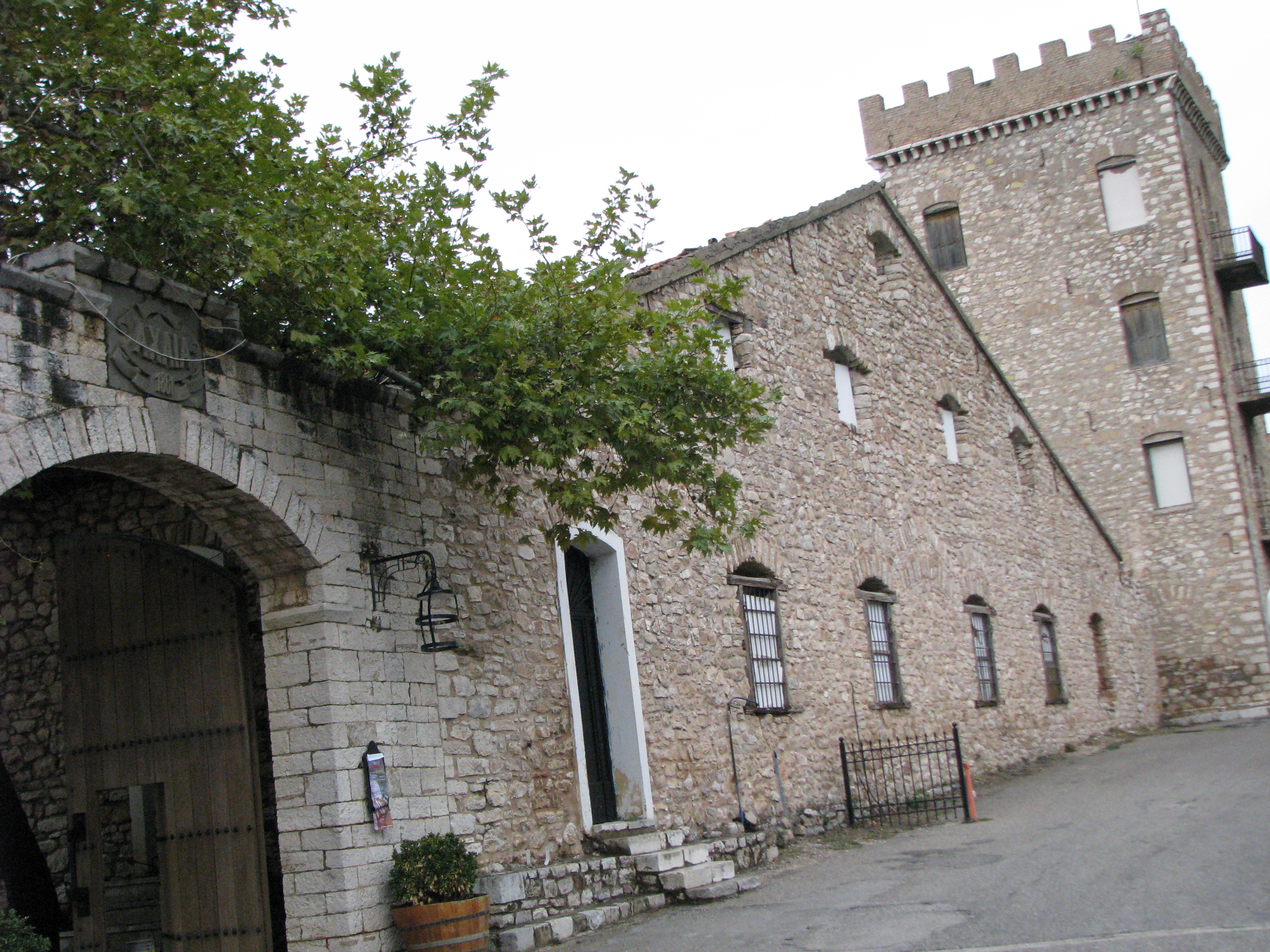 Οινοποιείο ΑΧΑΪΑ ΚΛΑΟΥΣ«Οινοποιείο ΑΧΑΪΑ ΚΛΑΟΥΣ»